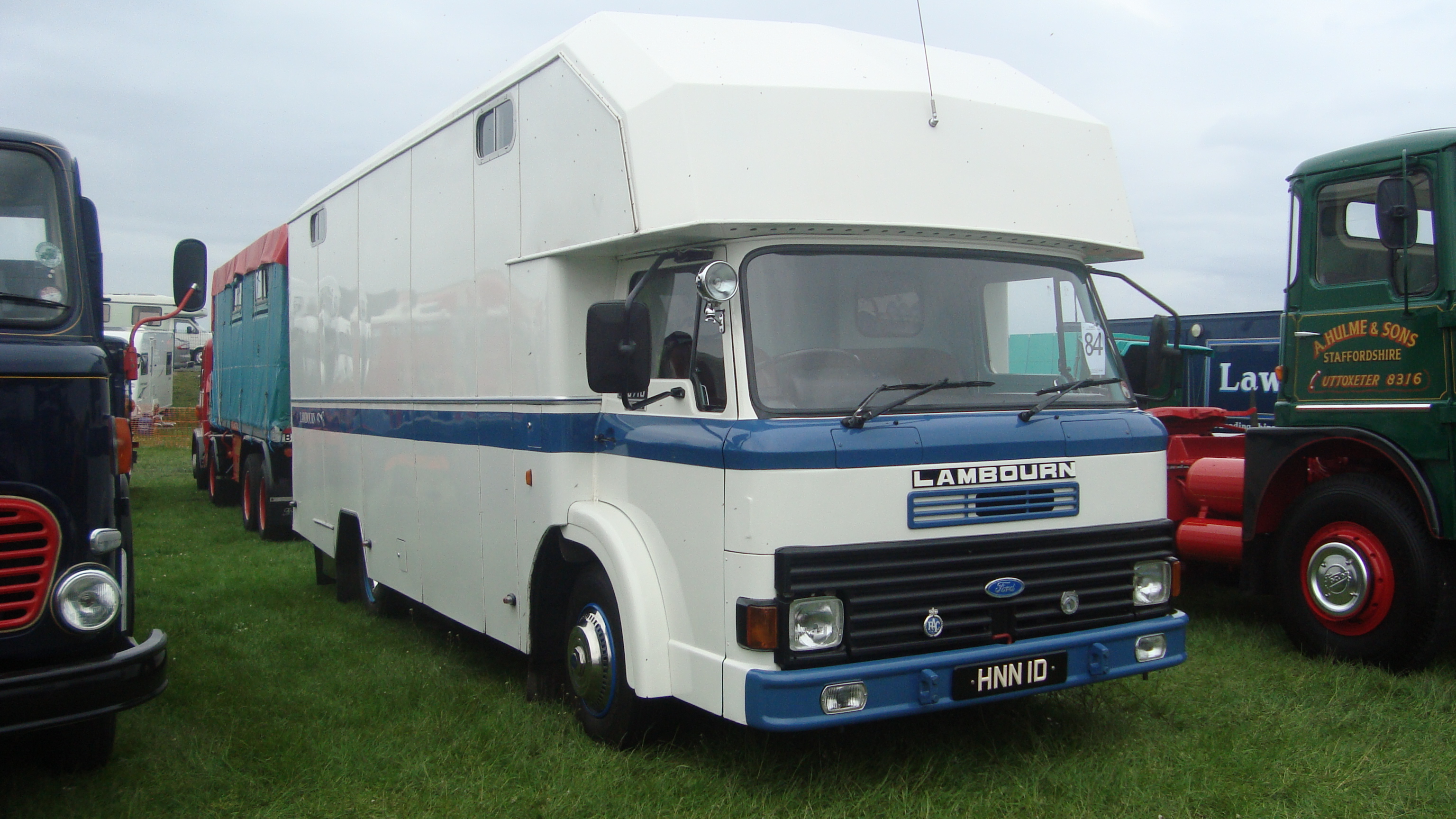 1979 Ford D Series